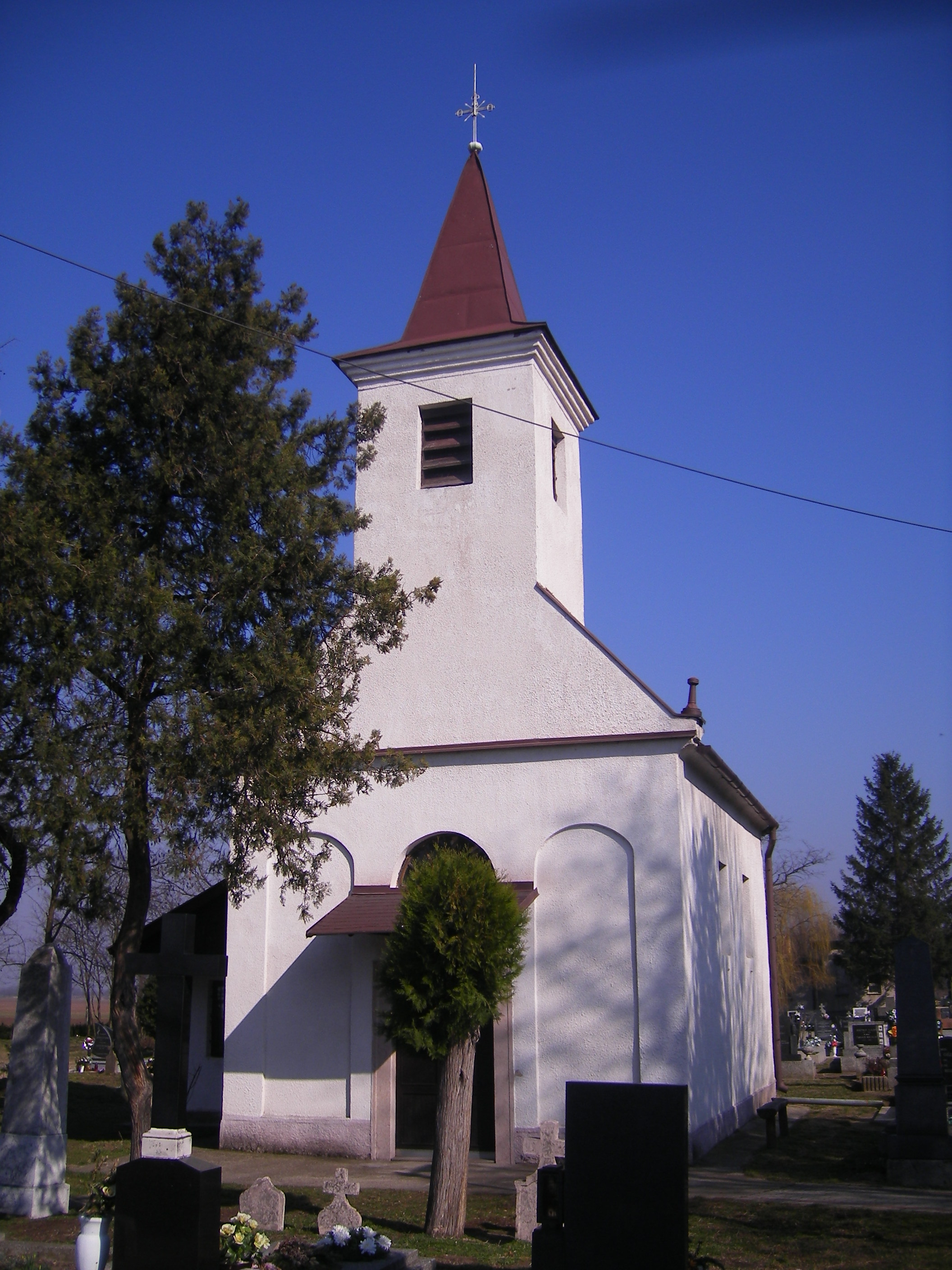 Dunaradvány - katolikus templom